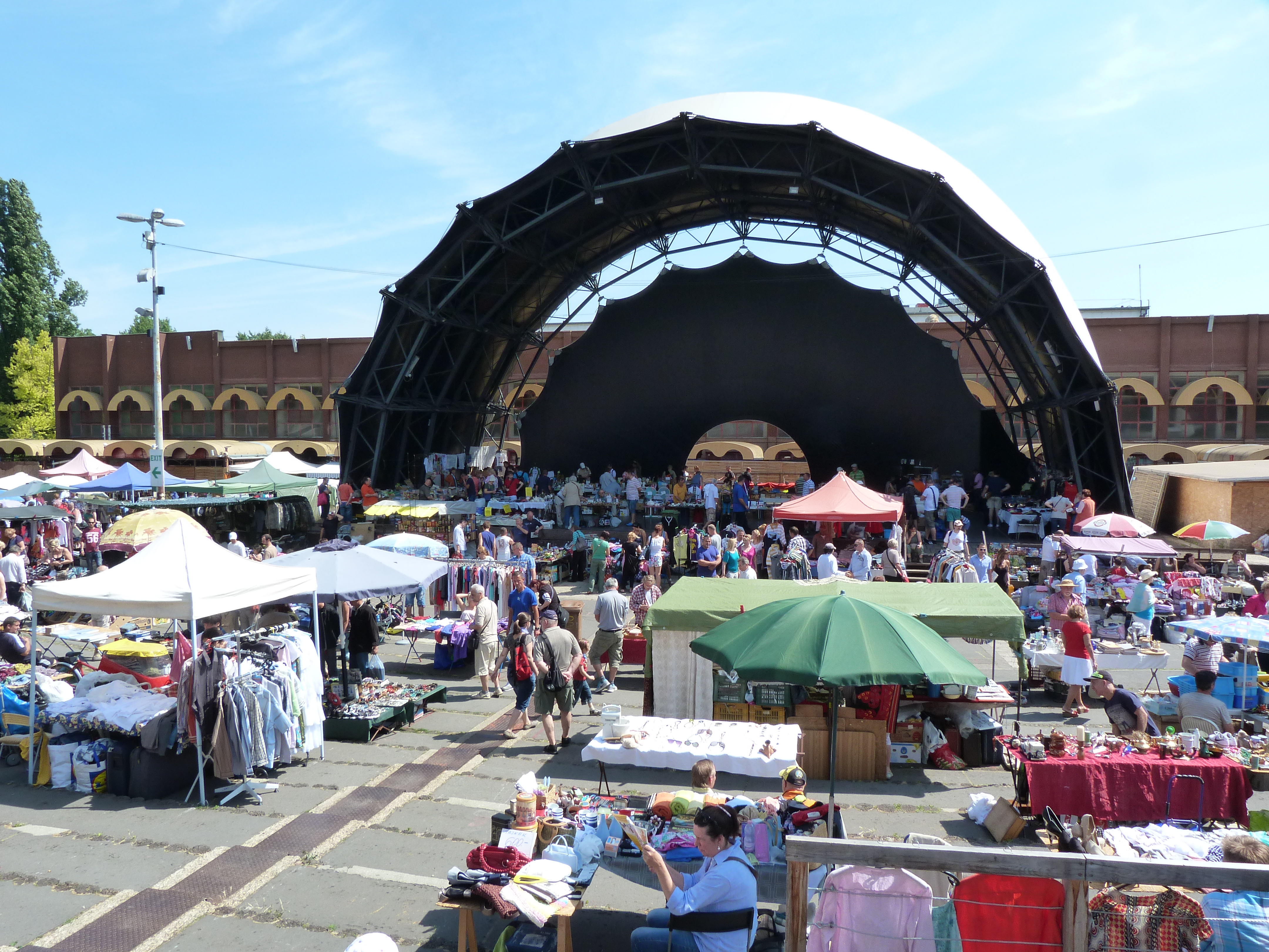 A felvétel 2014. június 28-án szombaton készült Budapesten, a PECSA-nál (Petőfi Csarnok, Petőfi Music Hall). Bolhapiac. .